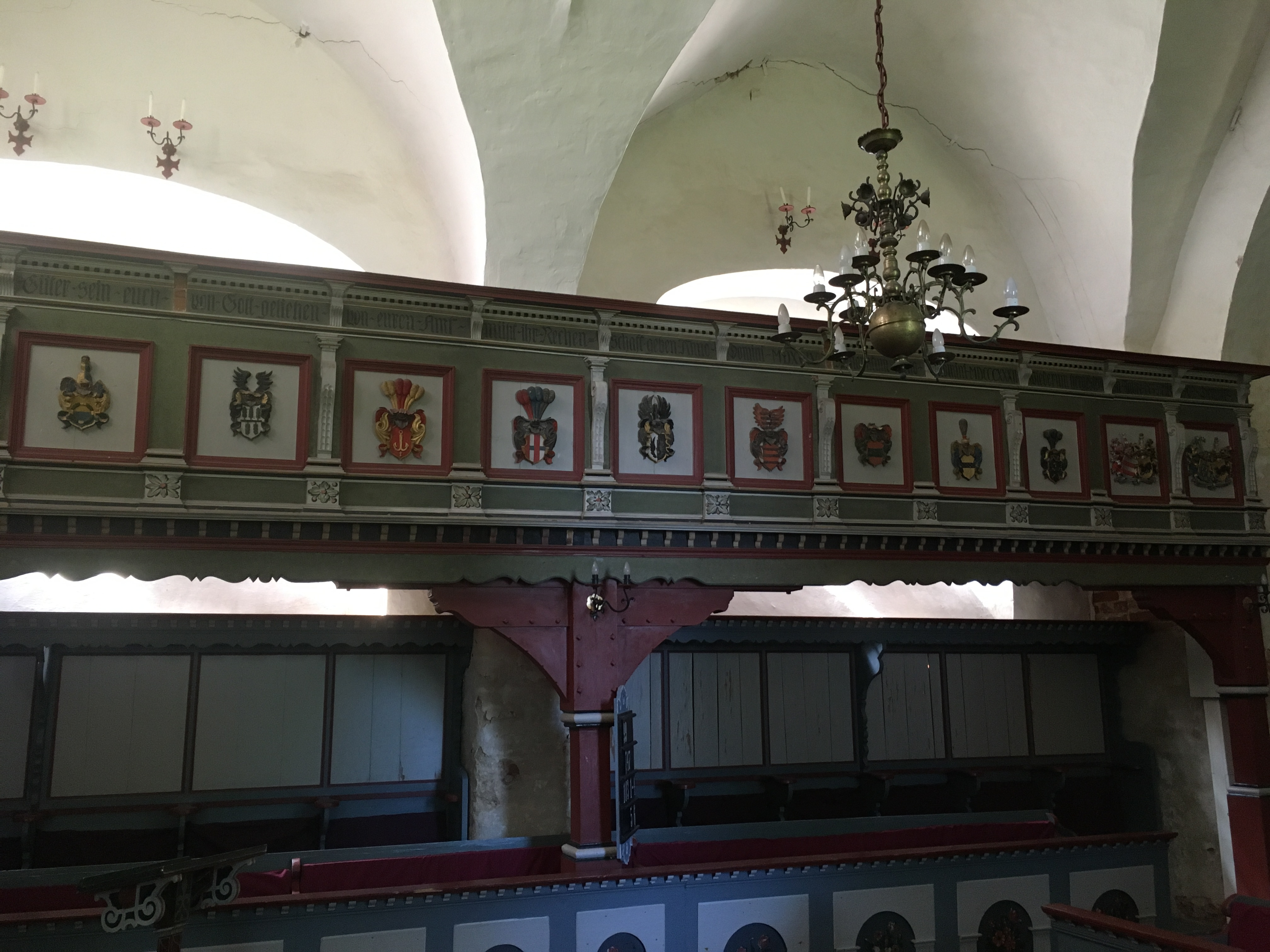 Die Dorfkirche Demnitz ist eine spätgotische Feldsteinkirche, an die Ende des 16. Jahrhunderts an der Ostseite eine Gruft angebaut wurde. Im Innern befinden sich unter anderem ein Altarretabel aus dem Ende des 16. Jahrhunderts, eine südliche Empore aus dem Jahr 1594 sowie eine Westempore mit Orgel von 1909.